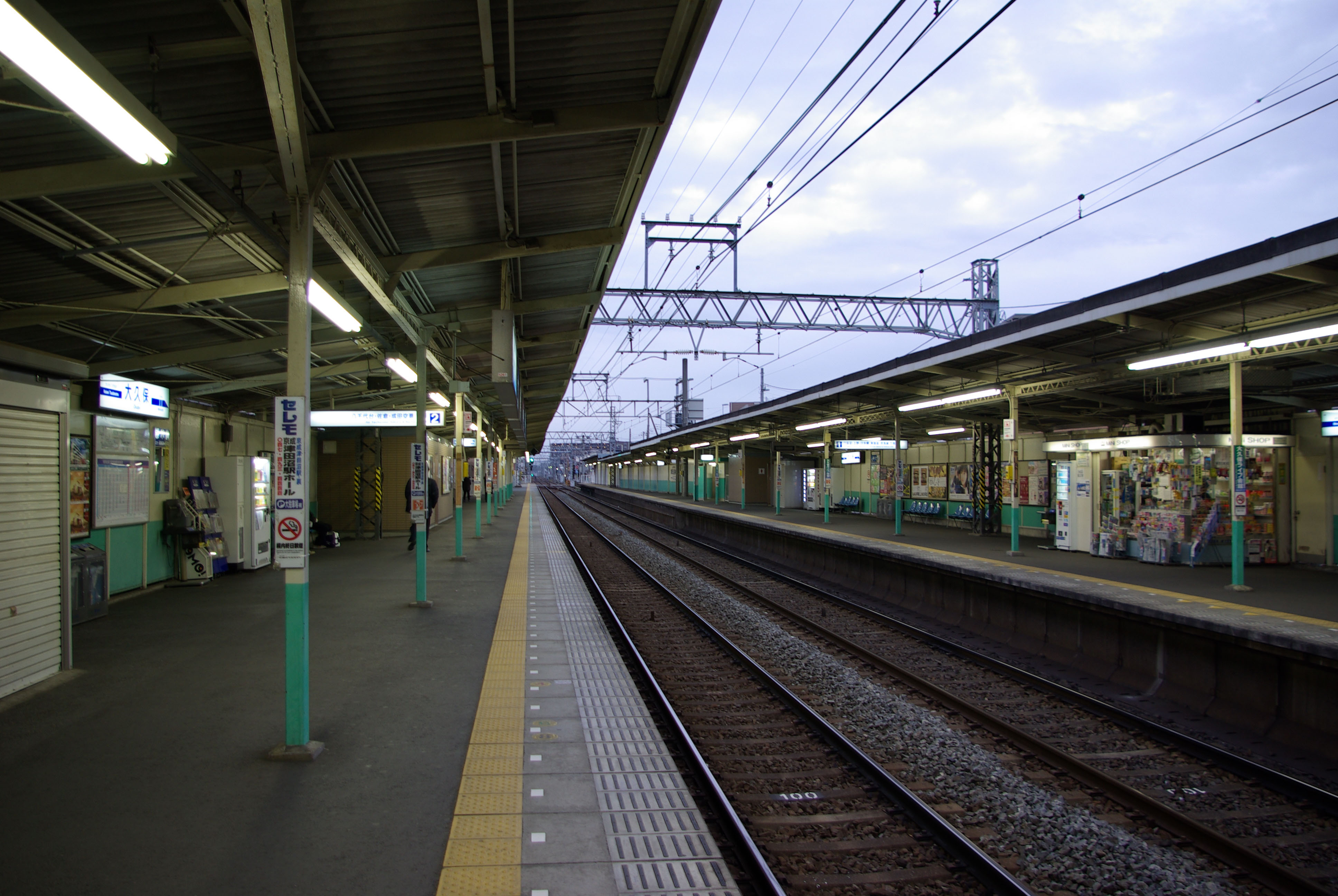 京成本線京成大久保駅ホーム